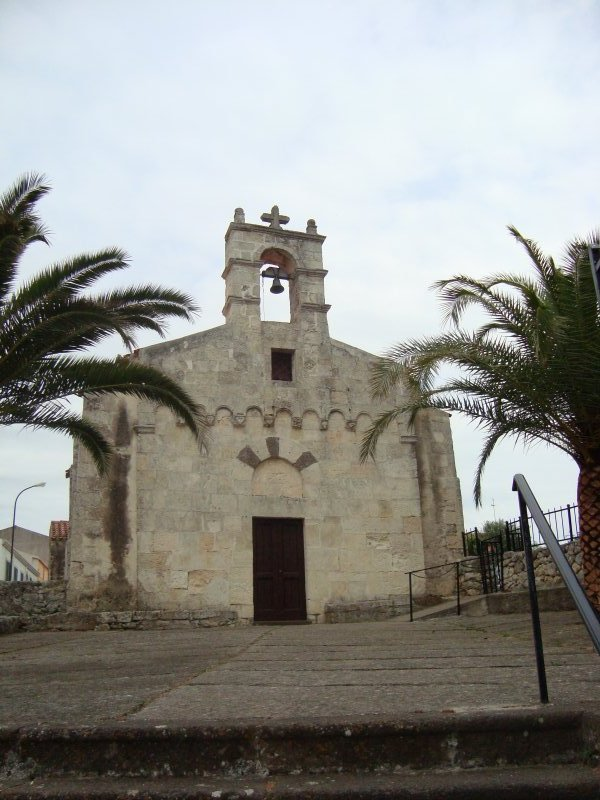 Chiesa di Santa Vittoria, patrona di Tissi